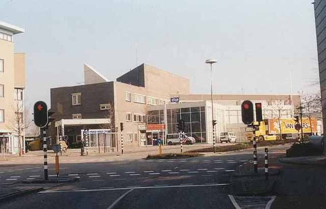 Bestand afkomstig van Alle bestanden op deze site mogen vrij worden gebruikt, tenzij anders staat vermeld volgens de disclaimer van de site (